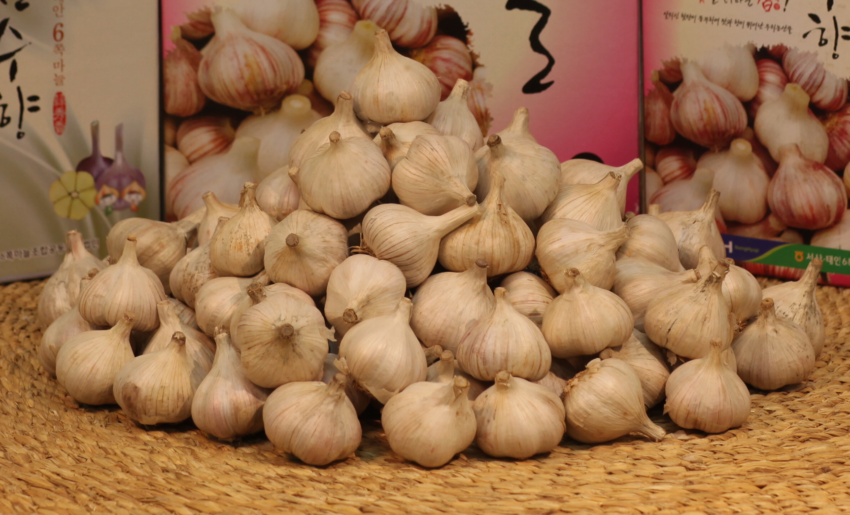 조선말: 서산의 6쪽마늘